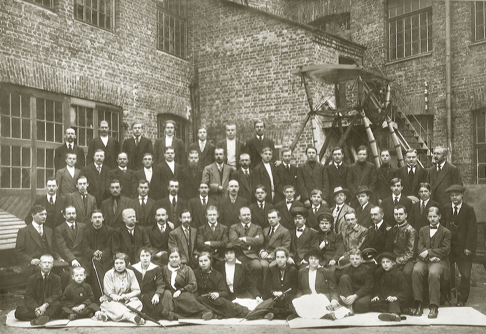 Коллектив завода Щетинина Гамаюн в Петрограде. 1917